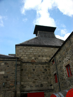 蘇格蘭高地區，麥芽威士忌蒸餾廠的寶塔造型煙囪 寶塔(Pagonda)造型的煙囪是蘇格蘭地區的麥芽威士忌蒸餾廠非常重要的建築象徵，原本的作用是酒廠在進行麥芽的烘烤(Kilning)過程時，為了排煙而設。不過，現代化的威士忌蒸餾廠常常已經不在酒廠裡自行烘烤麥芽而是直接向外面的專業麥芽供應商採購，但幾乎全部的酒廠都會保留這寶塔狀煙囪作為象徵物。 另外，煙囪的開口高度與層數往往也攸關這家酒廠烘烤麥芽時煙燻的程度！ 本照片拍攝於屬於高地區老牌酒廠之一的格蘭卓納赫(GlenDronach)蒸餾廠內。 本圖片由上傳者User:SElephant拍攝於2004年8月。